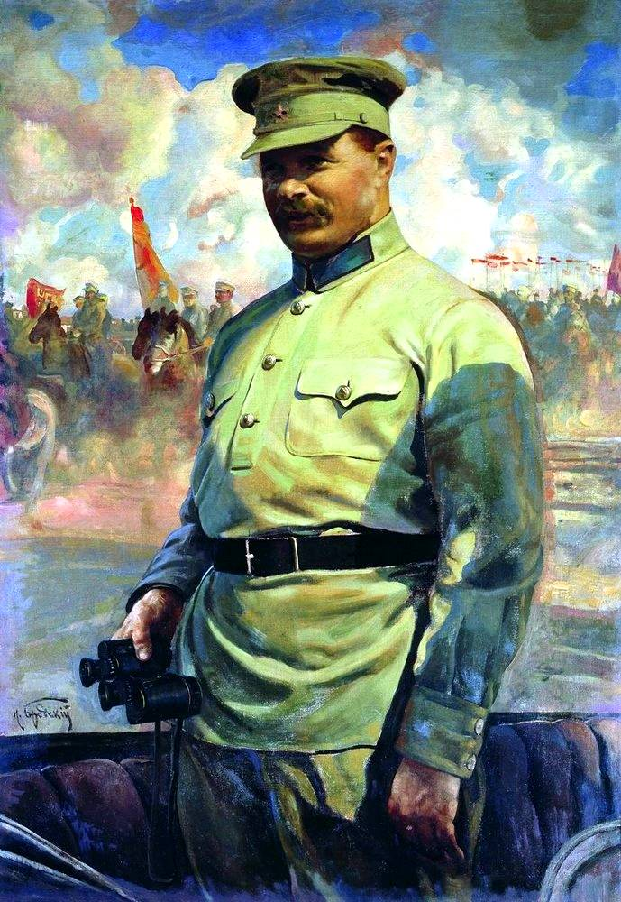 «М.В.Фрунзе на маневрах» 1929. Холст, масло. 133 x 93 см. Central Armed Forces Museum